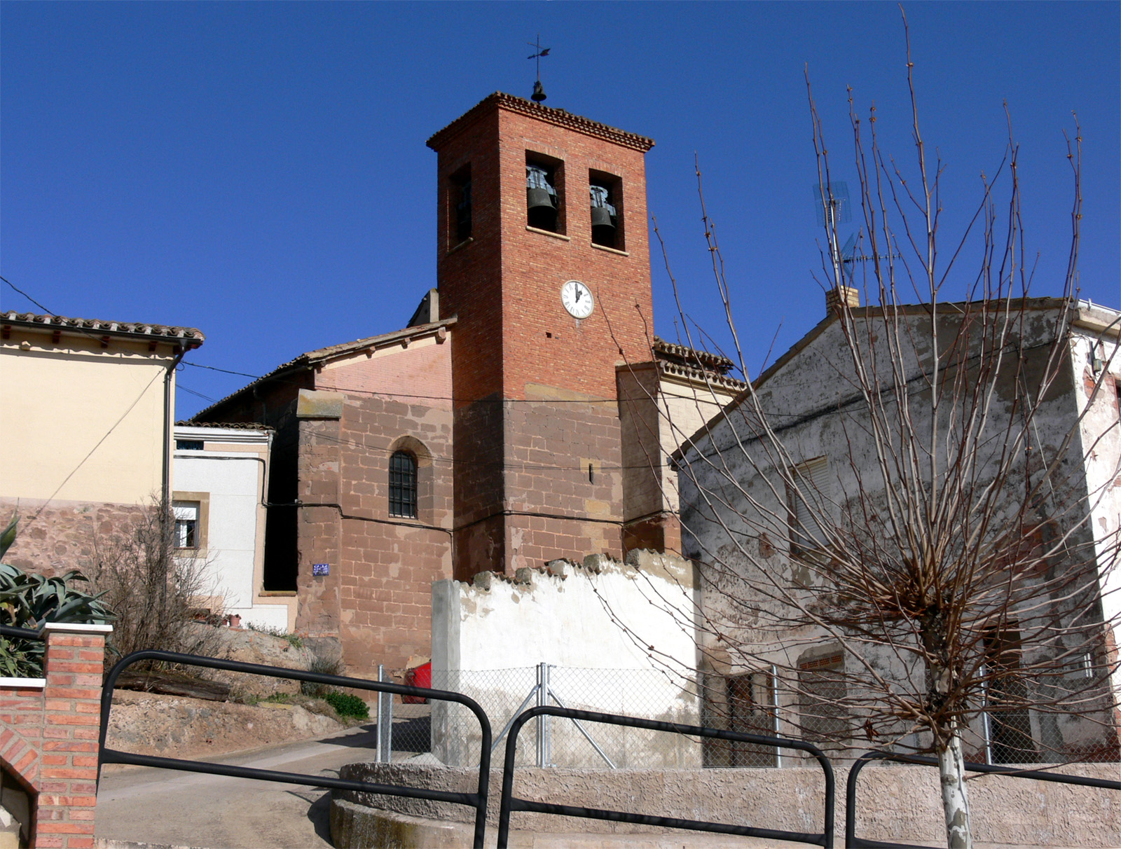 Iglesia de la Asunción en Torrecilla sobre Alesanco (La Rioja, España)